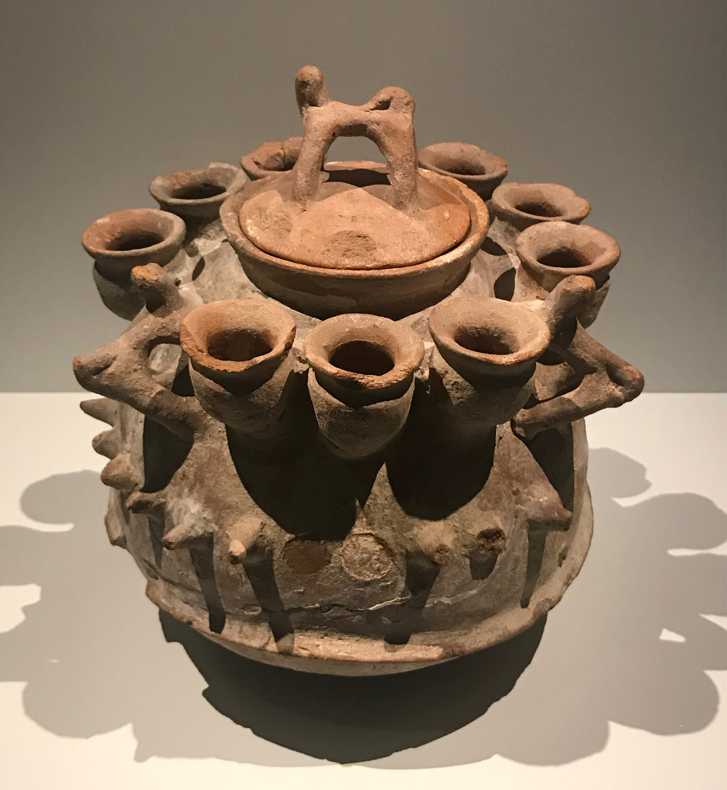 Marmite rituelle pour le culte de Mami Wata (Bénin, Porto-Novo) Fabriquée en terre cuite, kaolin. Acquise en 1970 par René Wadlow.